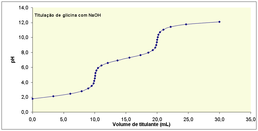 variação do pH na titulação da glicina